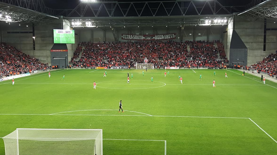 אצטדיון טרנר הפועל באר שבע משחקת נגד הפועל כפר סבא. הסתיים בניצחון באר שבע 0:3. 27 בפברואר 2017. בתמונה באר שבע תוקפת